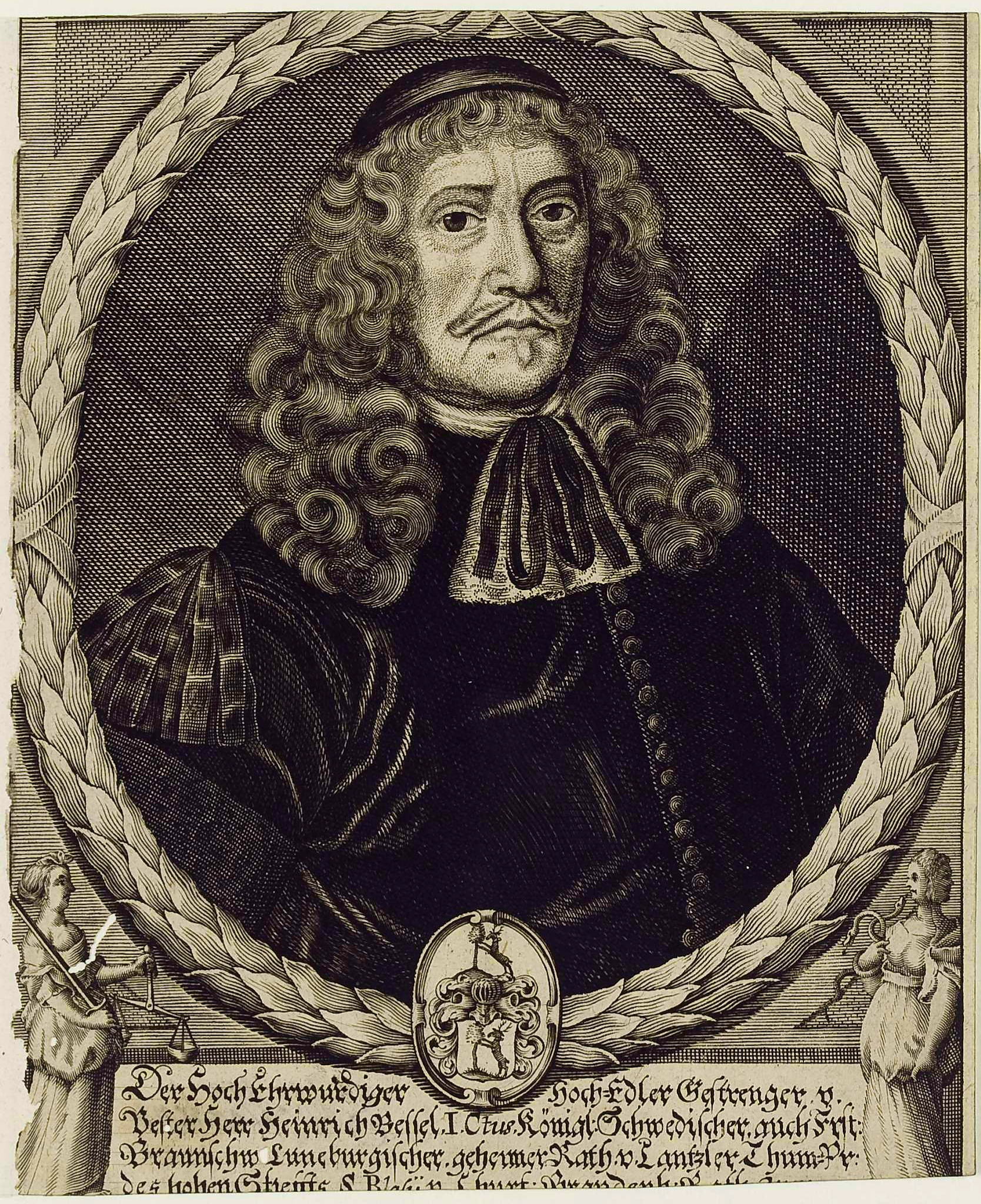 Porträt des Heinrich Bessel (1603–1671), Erbsasse zu Petershagen/Westfalen; Respondent an der Universität Marburg; königlich schwedischer, auch braunschweig-lüneburgischer Kanzler des Fürstentums Minden, ab 1648 Rat des Kurfürsten von Brandenburg sowie Dompropst des Stifts St. Blasii in Braunschweig (1649-1671), auch oldenburgischer Rat.